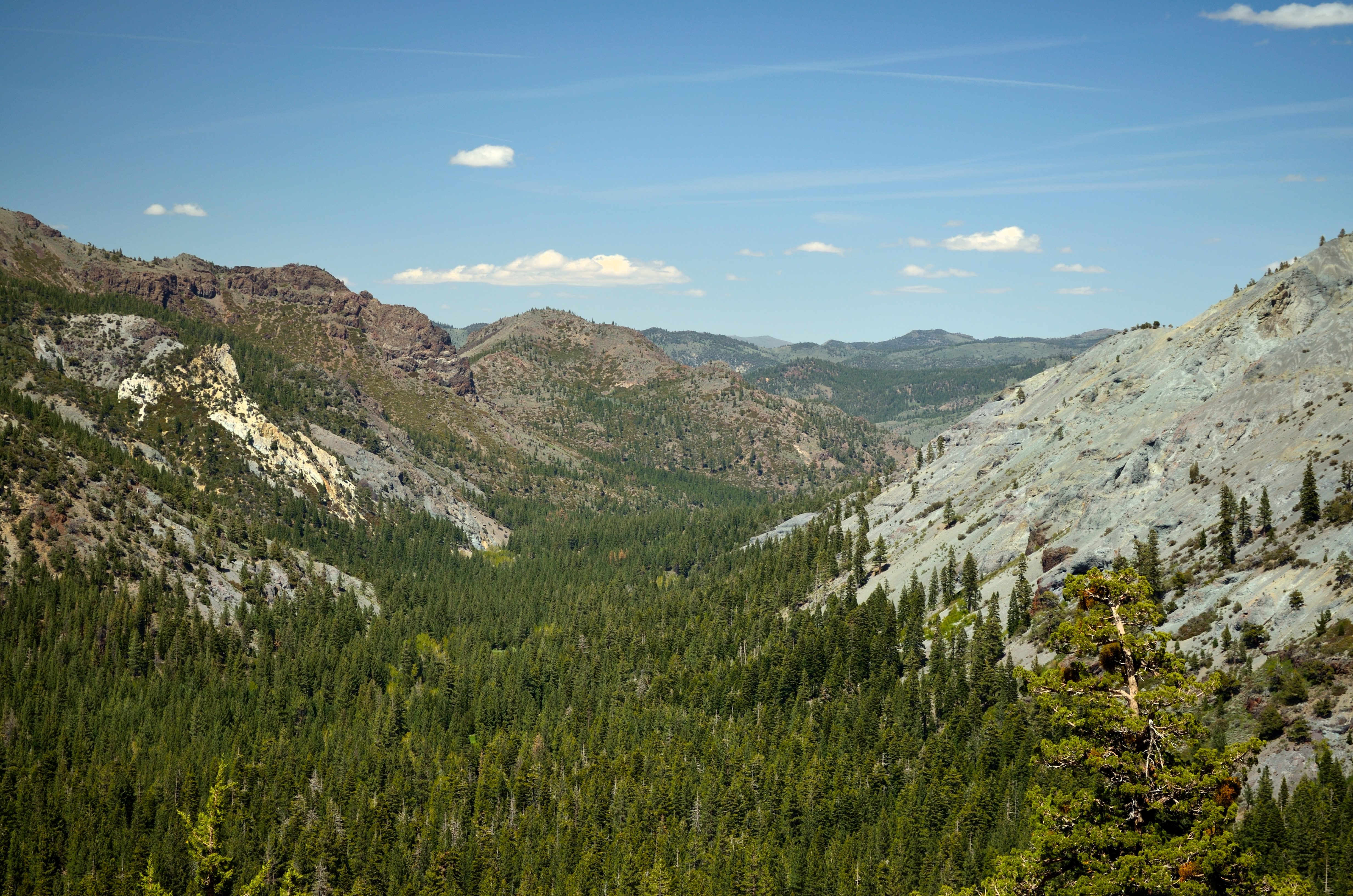 Ebbetts Pass 07